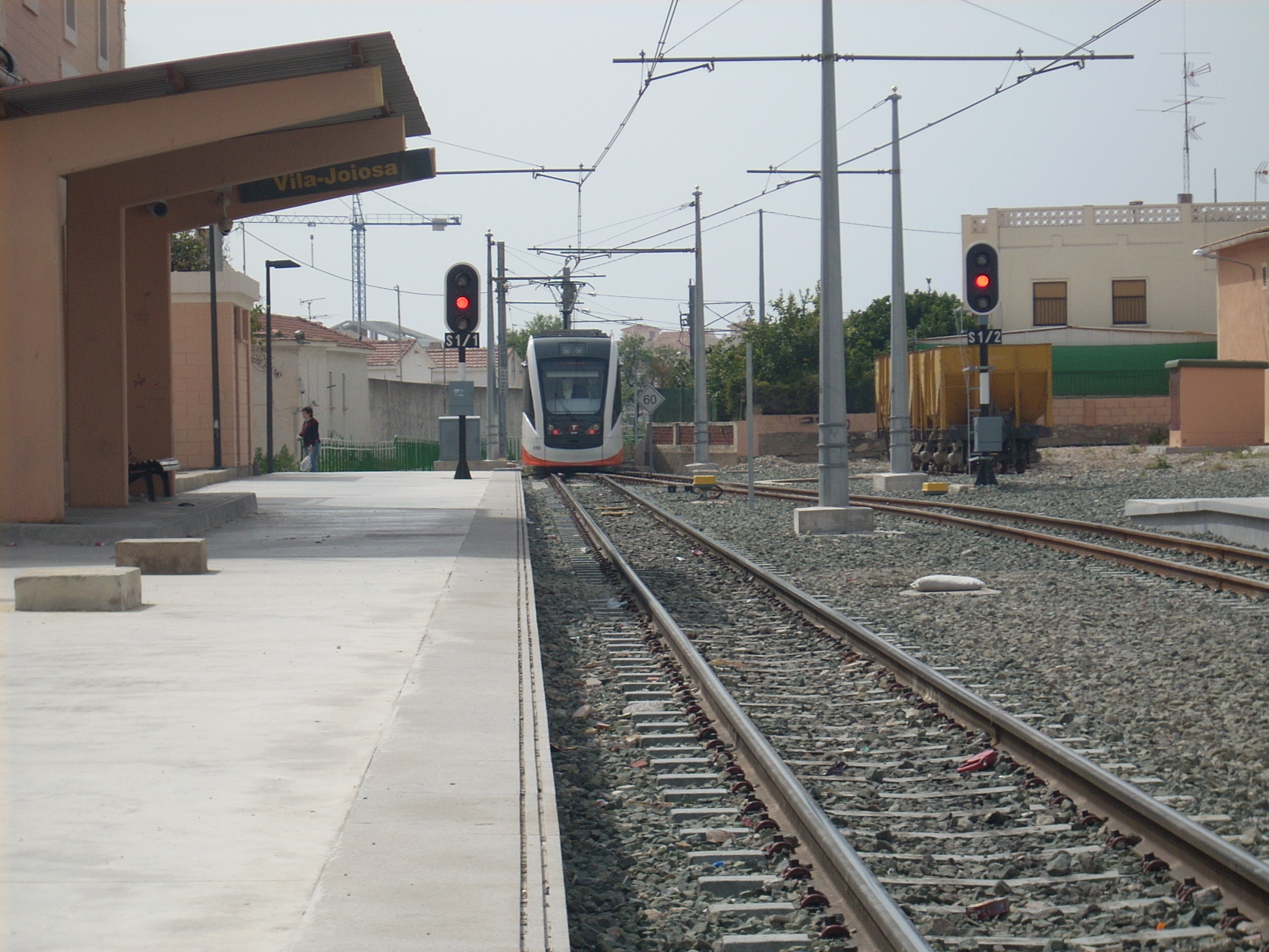 Estacion de La Vila Joiosa en el casco urbano del mismo nombre.